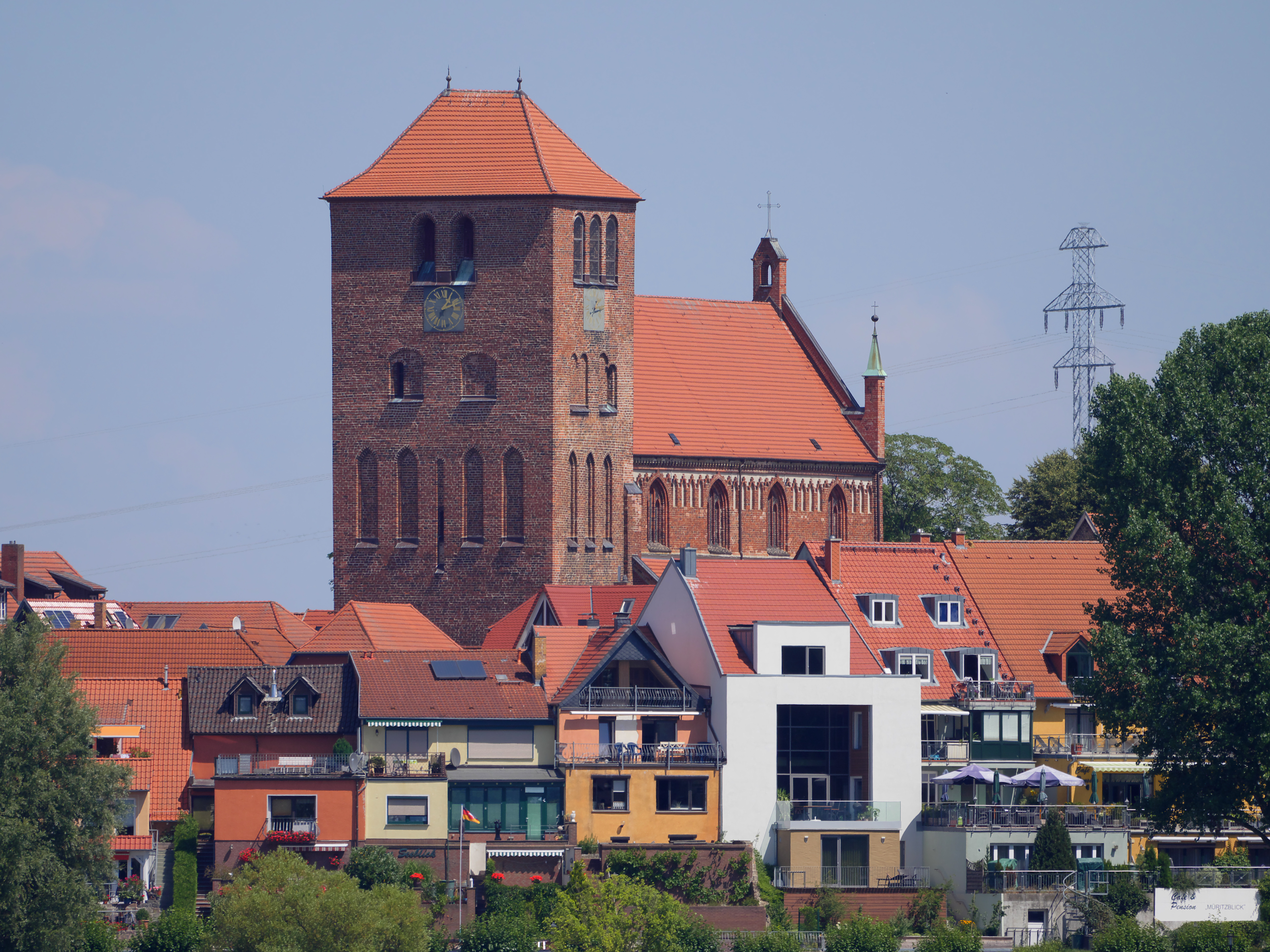 Georgenkirche in Waren an der Müritz (Deutschland) von der Müritz aus gesehen.